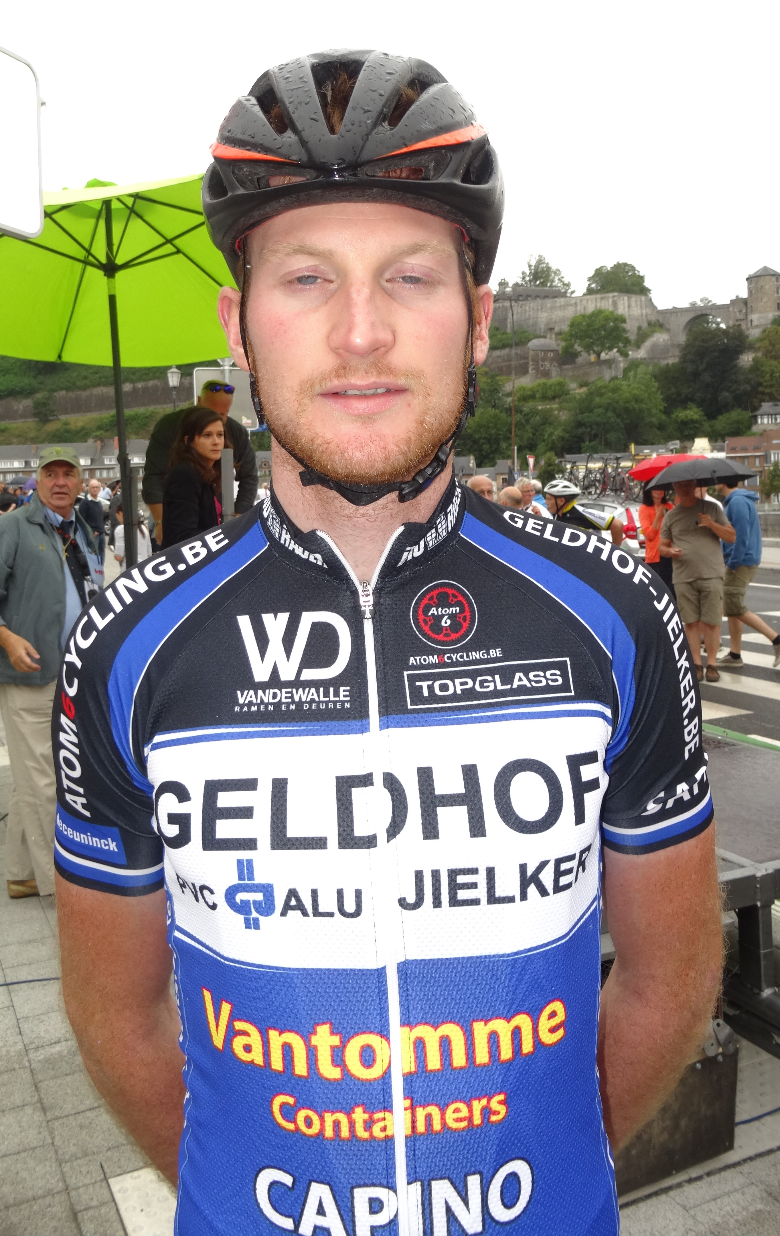 Reportage photographique réalisé le mercredi 6 août à l'occasion du départ de la première étape du Tour de la province de Namur 2014 à Jambes (Namur), Belgique.